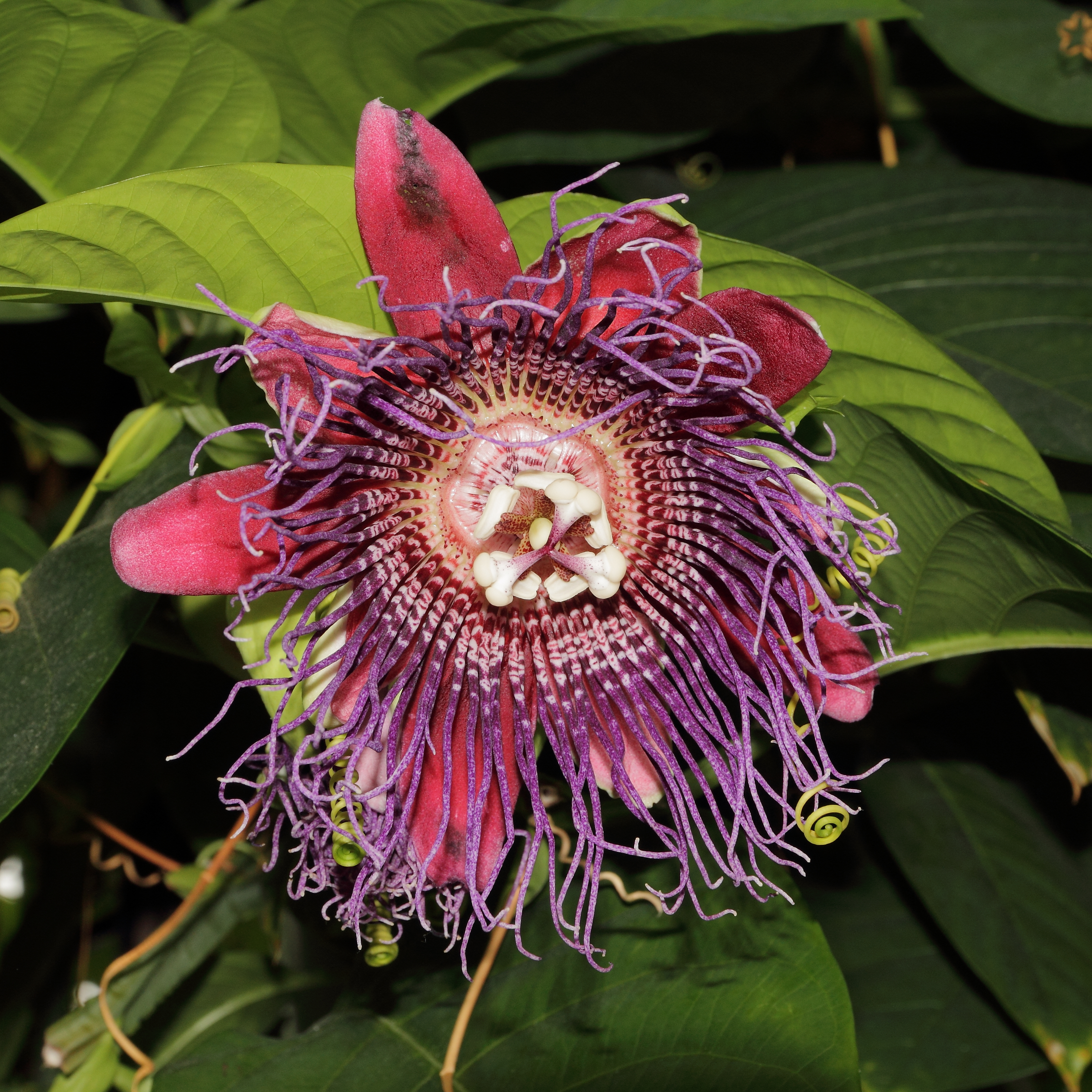 Passiflora quadrangularis i Bergianska trädgården.